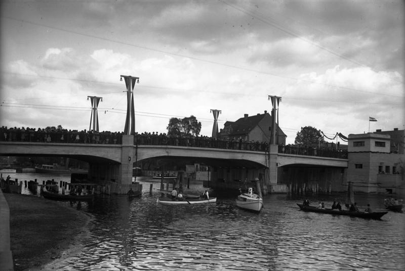 Die Jahrtausendfeier der Stadt Brandenburg/Havel! Die feierliche Einweihung der "Jahrtausend-Brücke" in Brandenburg a/Havel.